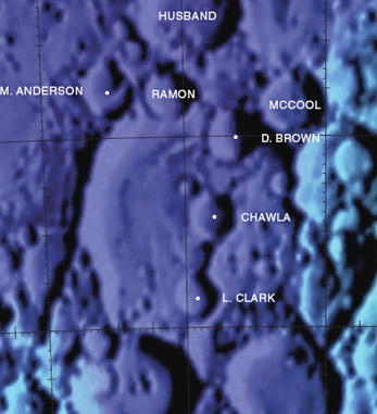 乔娜陨石坑照片